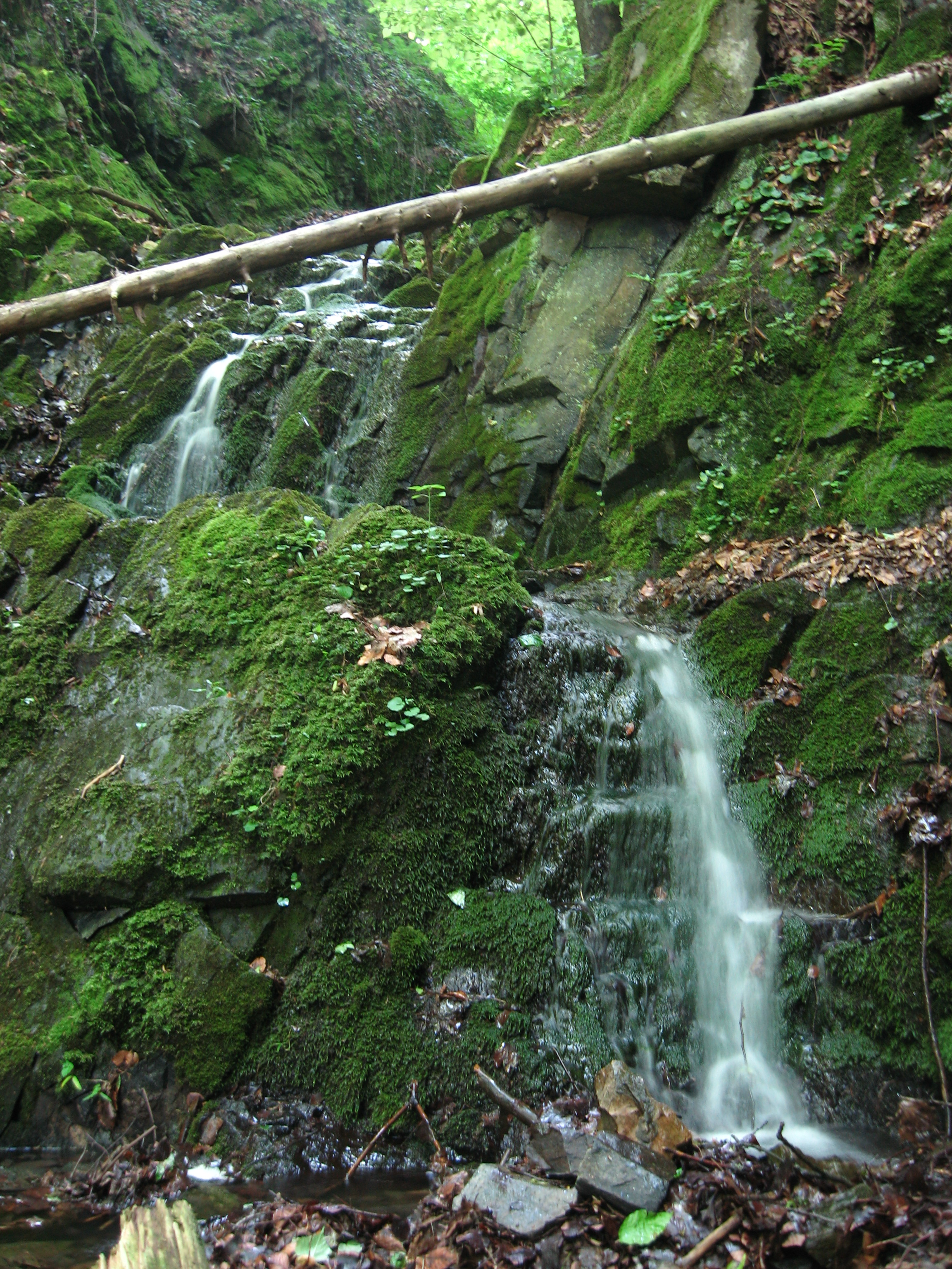 Samechovský vodopád